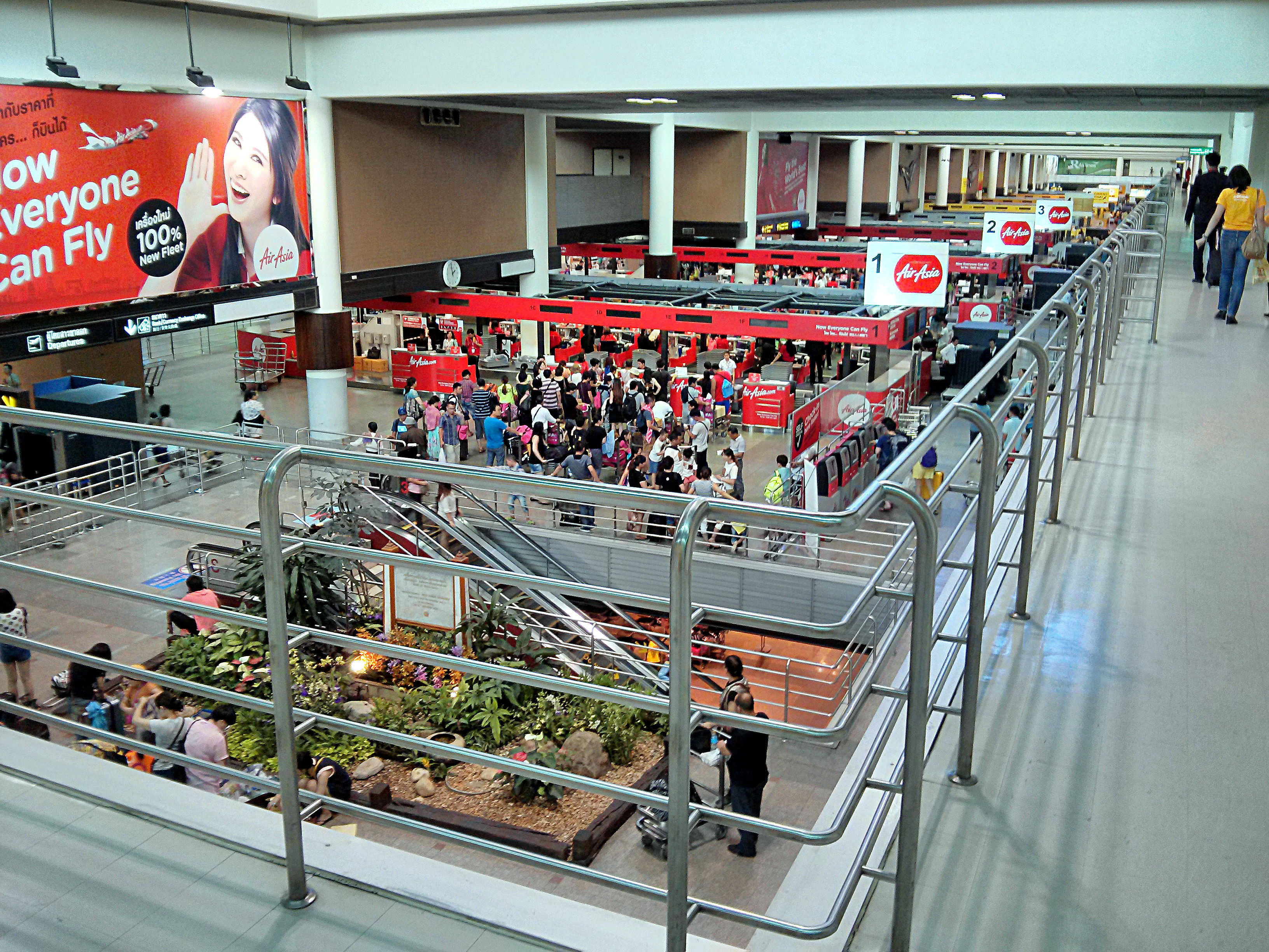 Terminal 1 at Bangok DMK Airport